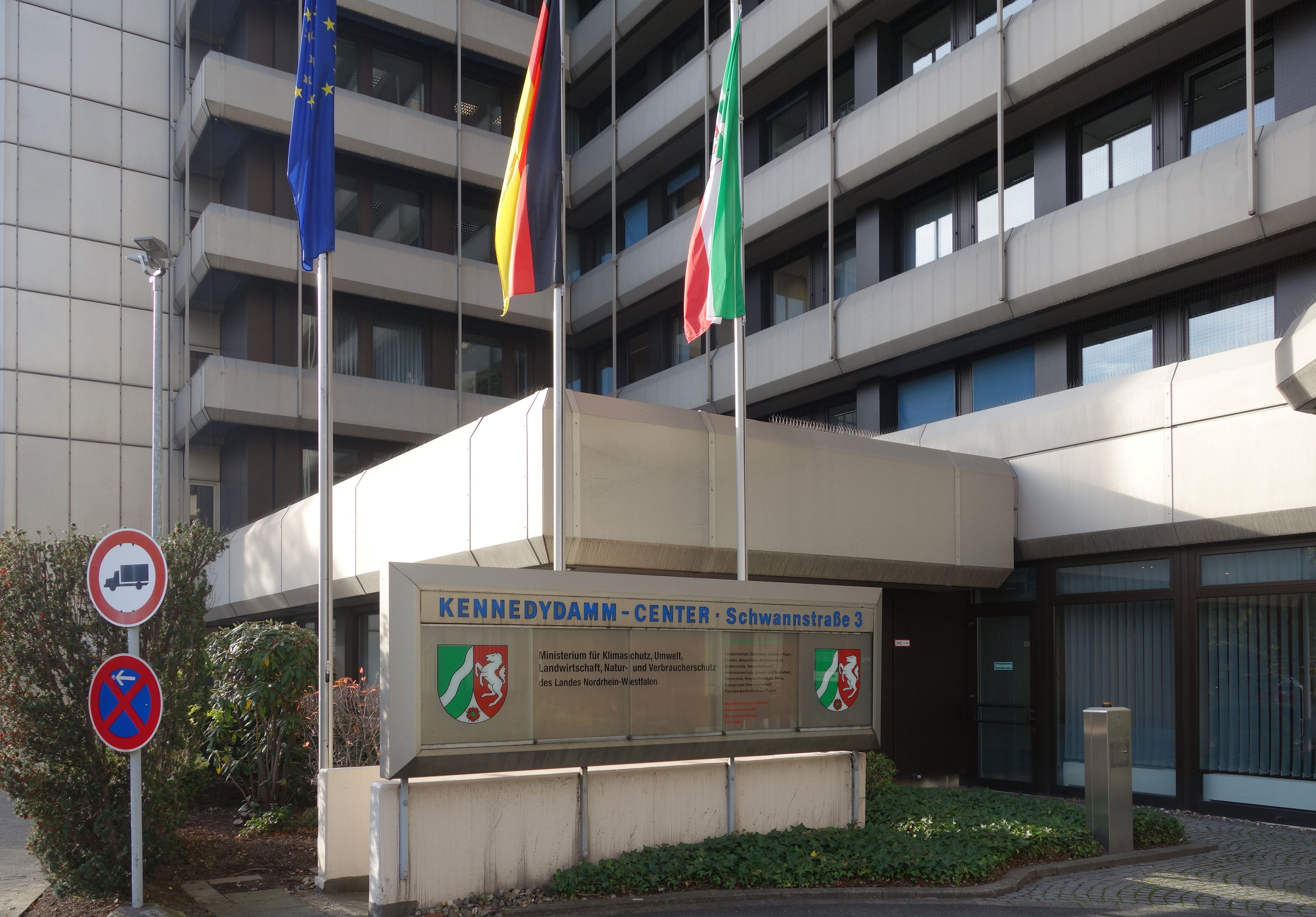 Ministerium für Klimaschutz, Umwelt, Landwirtschaft, Natur- und Verbraucherschutz des Landes Nordrhein-Westfalen, Düsseldorf, Schwannstraße 3.